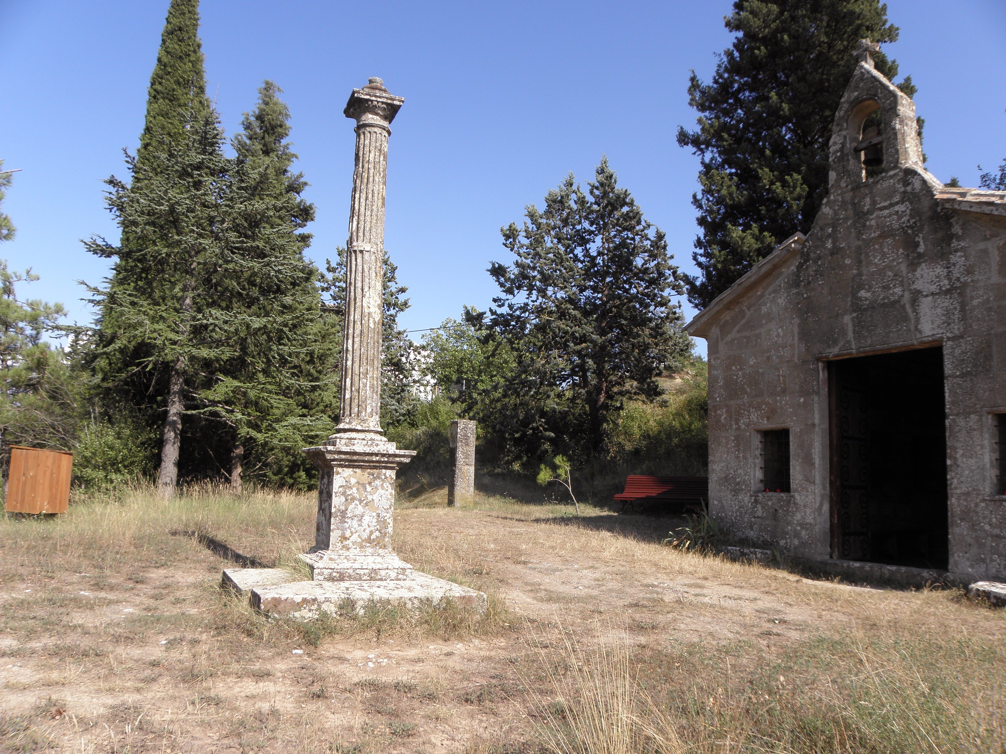 La creu de la columna de davant la Capella de la Desaparició, al Santuari del Miracle (Riner, Solsonès)